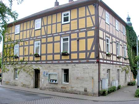 Das Rathaus der Gemeinde Schenklengsfeld